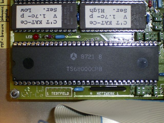 Thomson TS68000